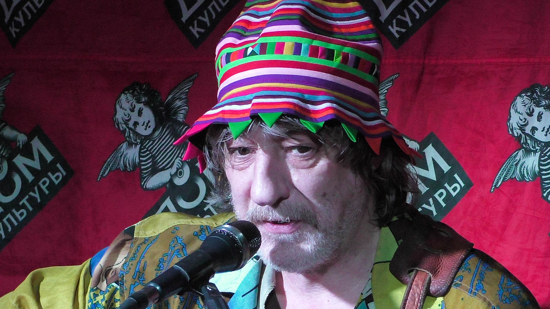 25.12.2016. Дом Культуры.